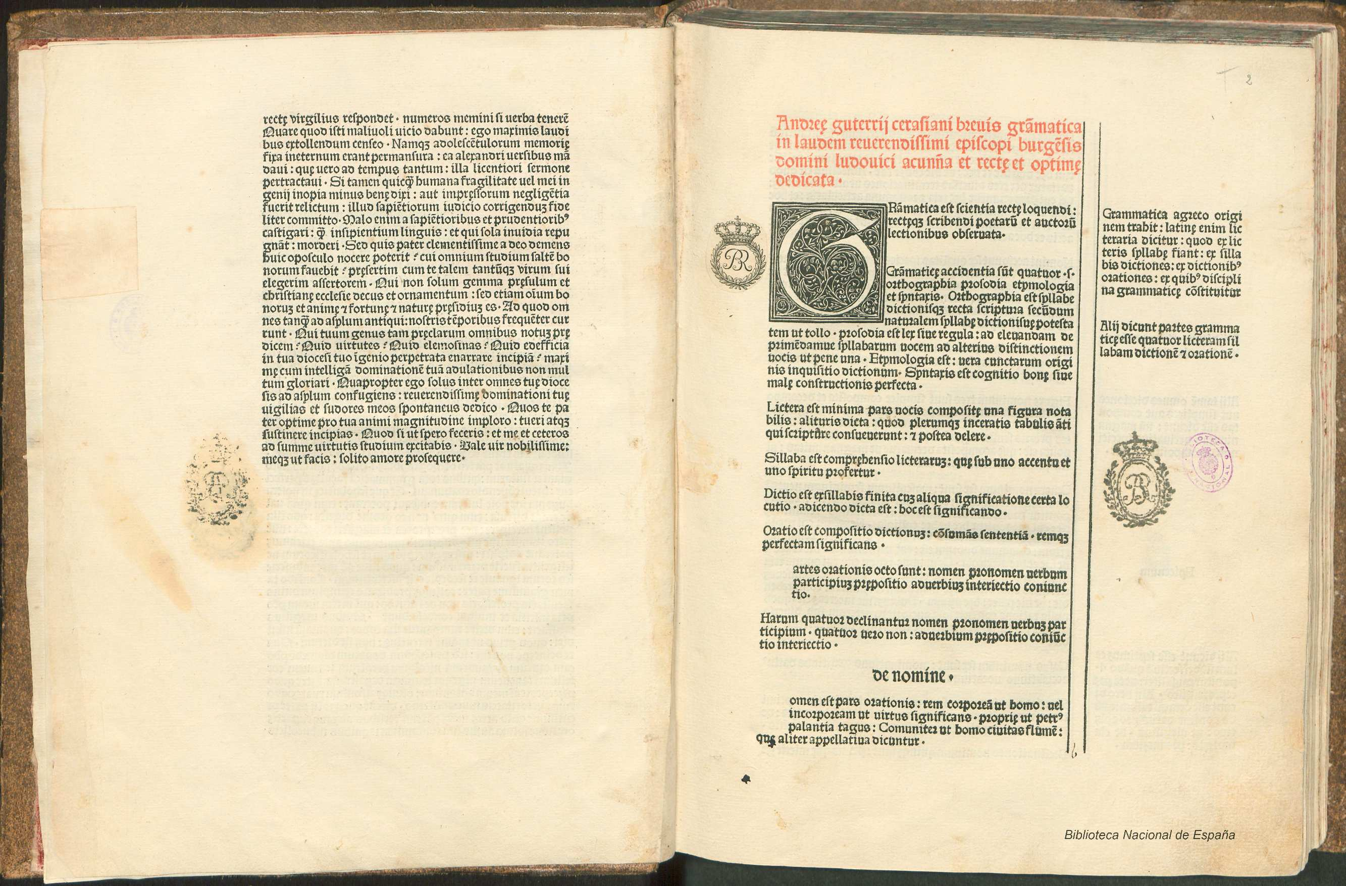 Grammatica Autor: Gutiérrez, Andrés Fecha: 1485 Datos de edición: Burgis impressum est per ingeniosum virum magistrum federicum (Biel de Basilea, Fadrique)